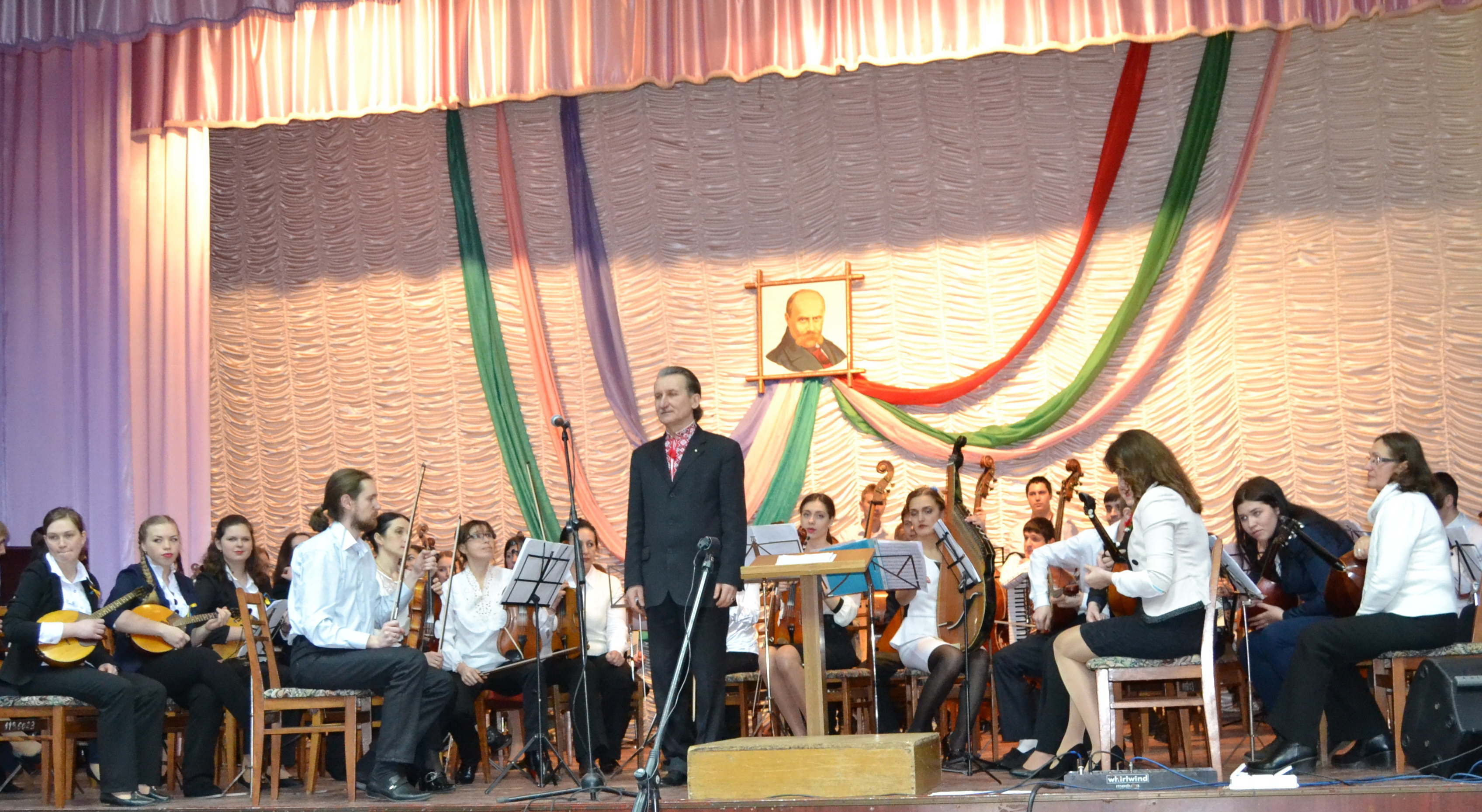 народний артист України, професор Микола Шумський із Зведеним оркестром народних інструментів НДУ ім. М. Гоголя та НККіМ ім. М. Заньковецької у Шевченківській програмі "НІЖИН-МУЗ-ФЕСТ"